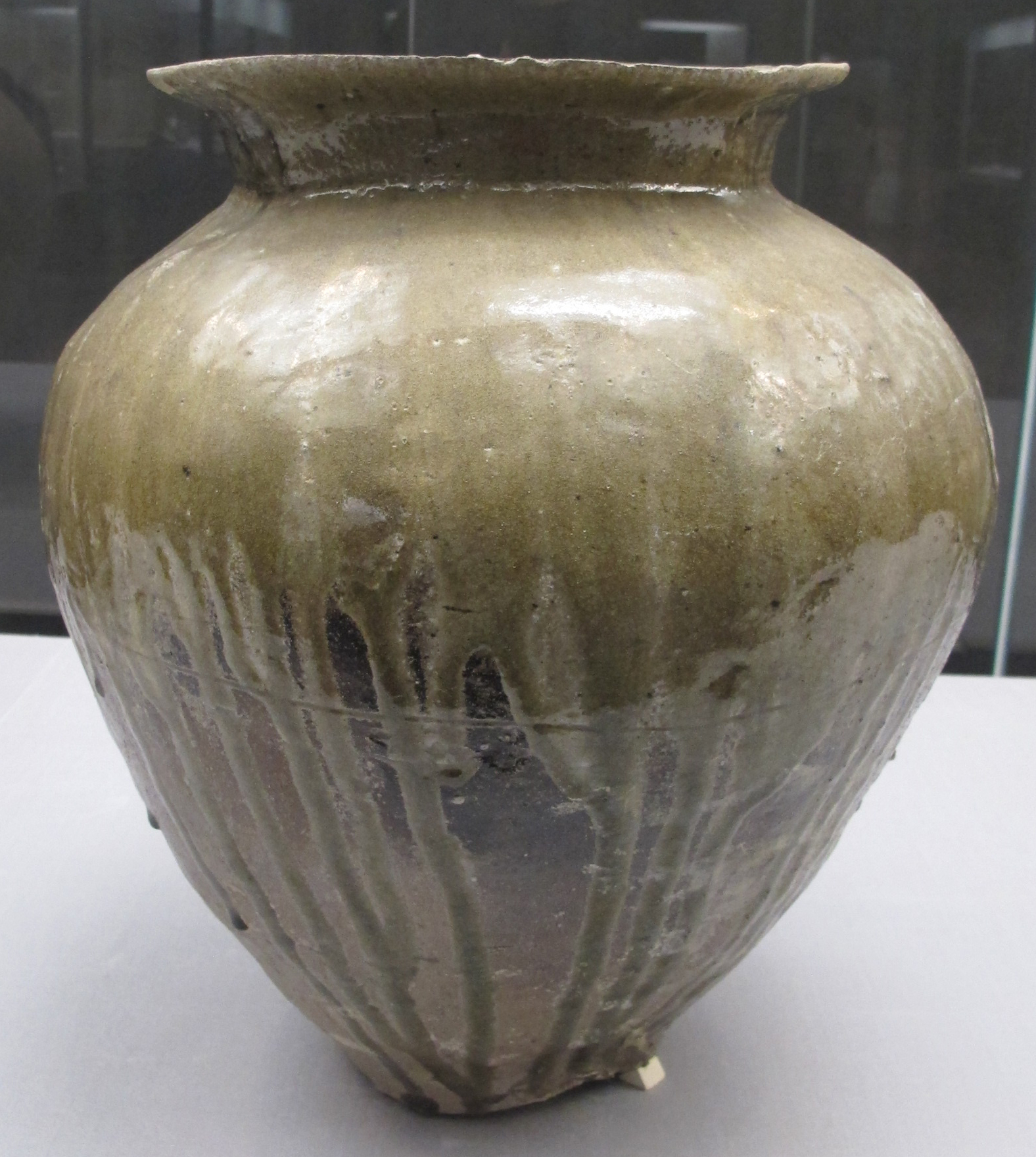 Periodo heian, giara, XII sec